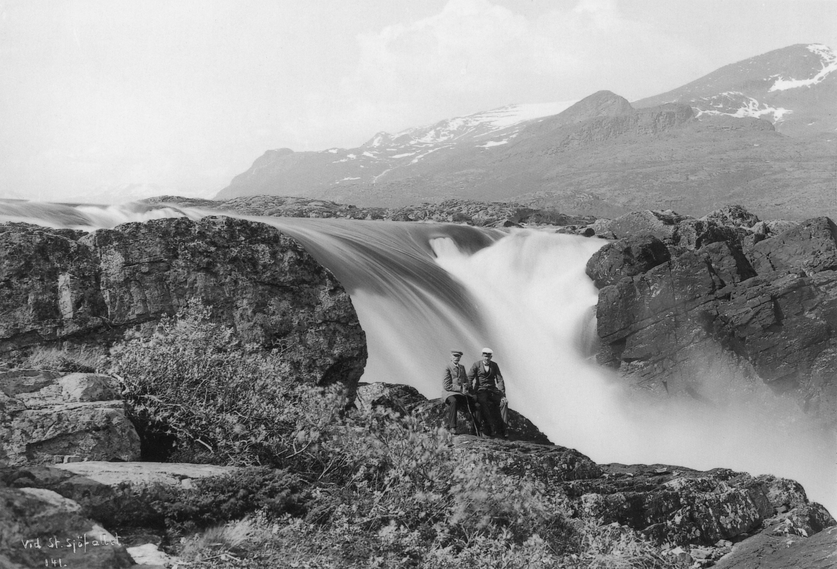 depicted place: Lappland, Stora Sjöfallet (Sverige (SE))